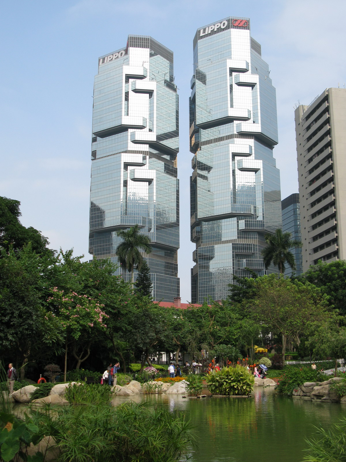 力寶中心及香港公園 Lippo Centre & Hong Kong Park